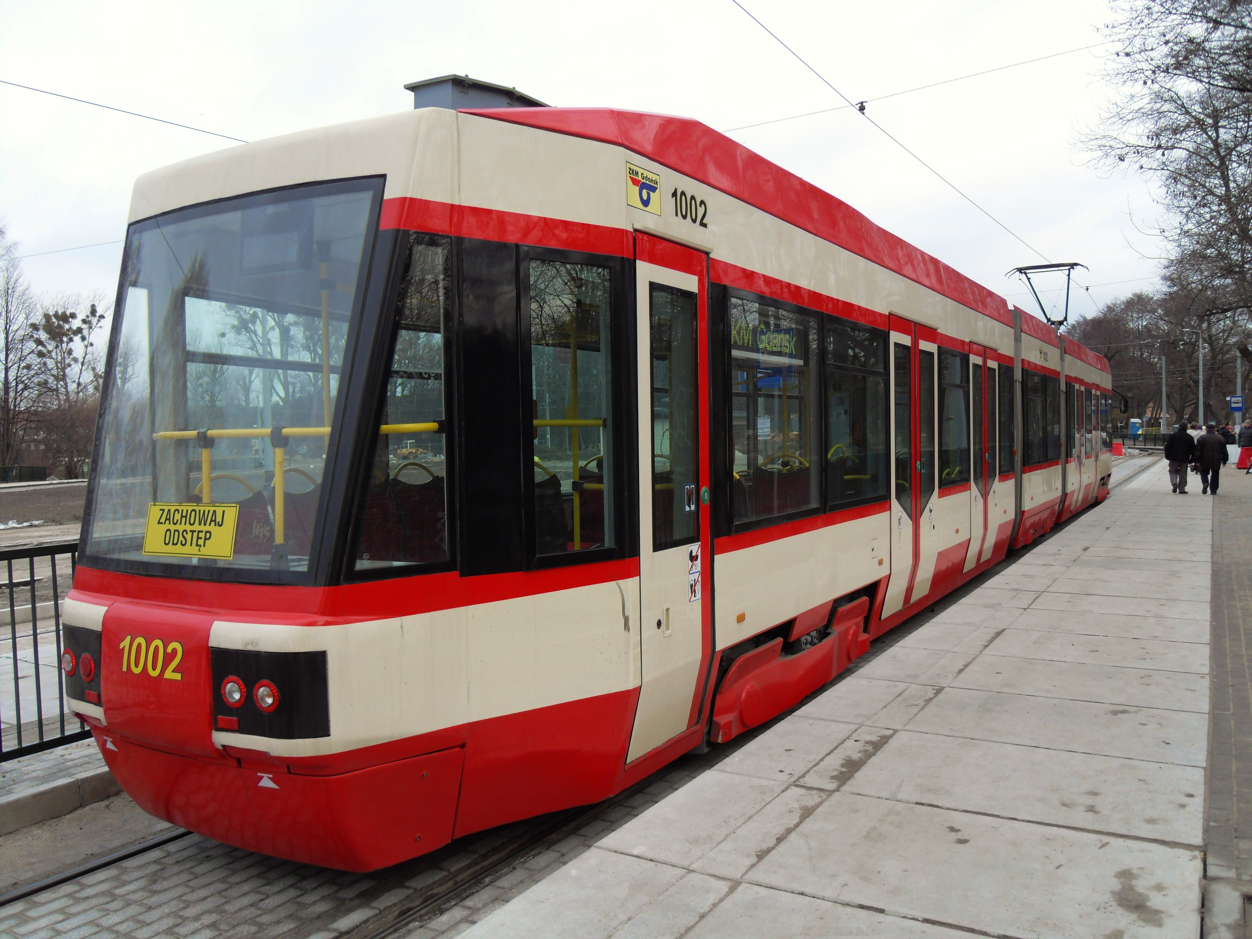 Gdańsk. Tramwaj Konstal NGd99 (#1002).